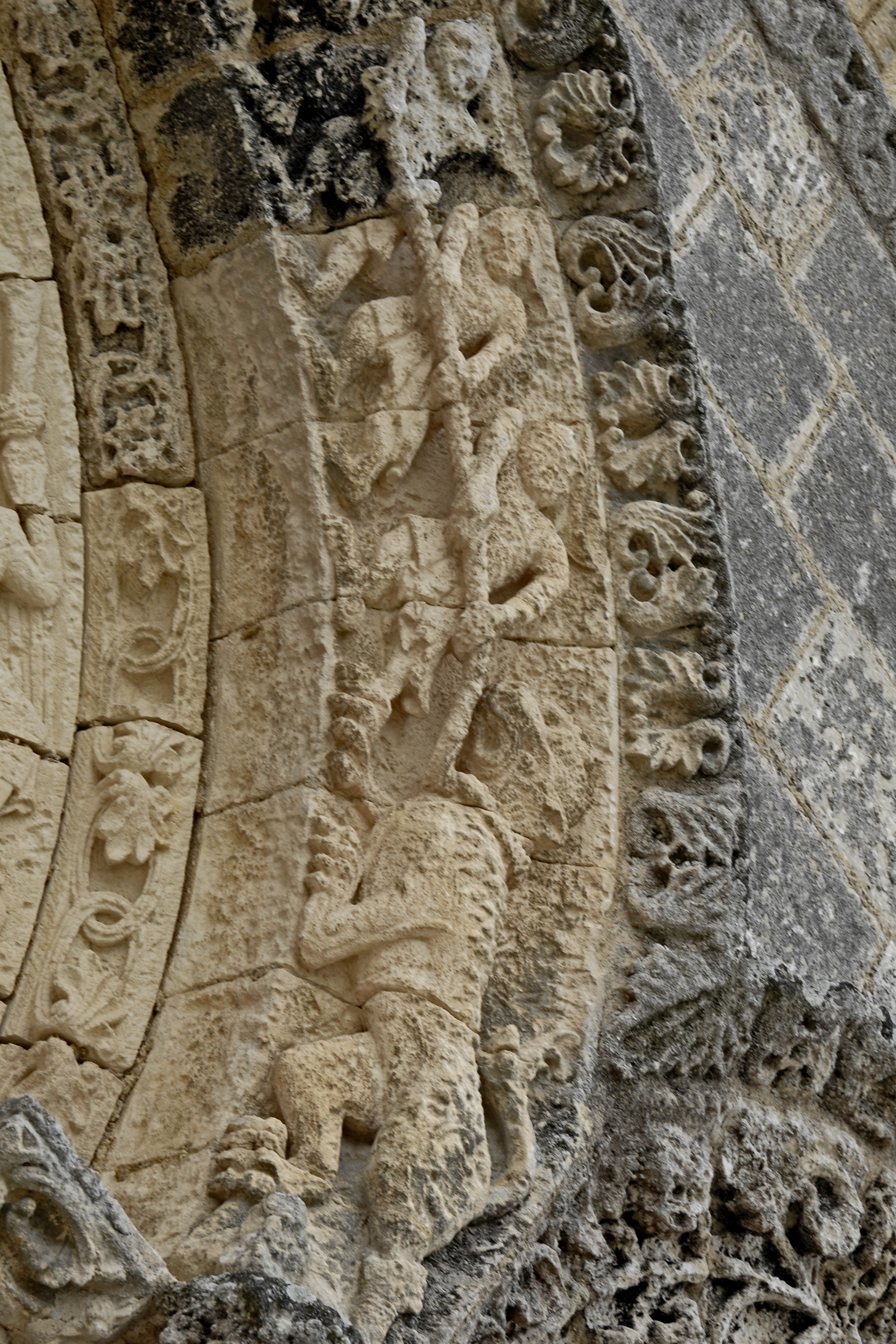 Sainte-Radegonde-Talmont-sur-Gironde, "Zugtier" Löwe